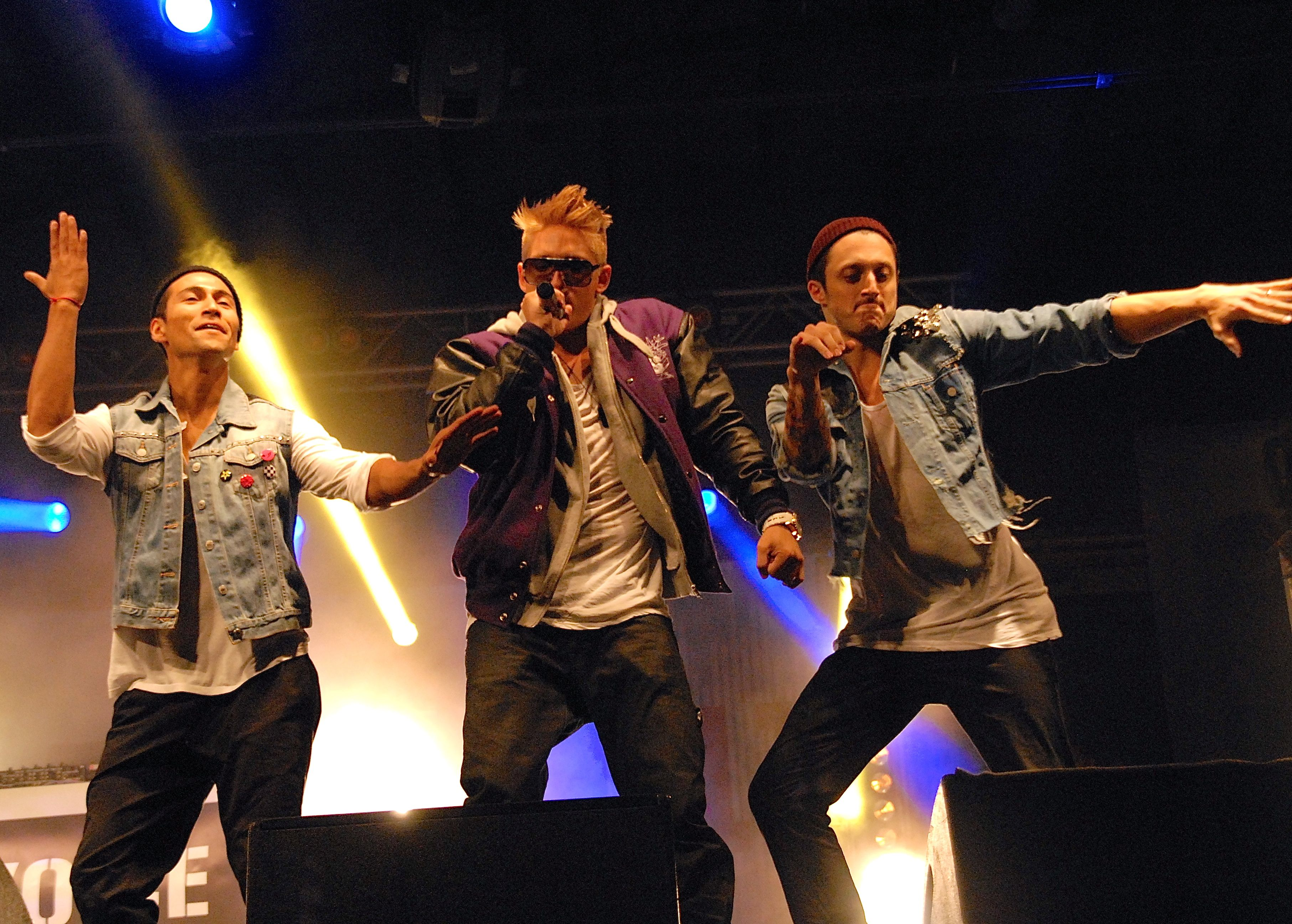 Danny Saucedo på Ung08-festivalen i Stockholm 20 augusti 2011.